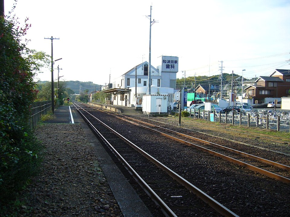 天竜浜名湖鉄道知波田駅 駅構内